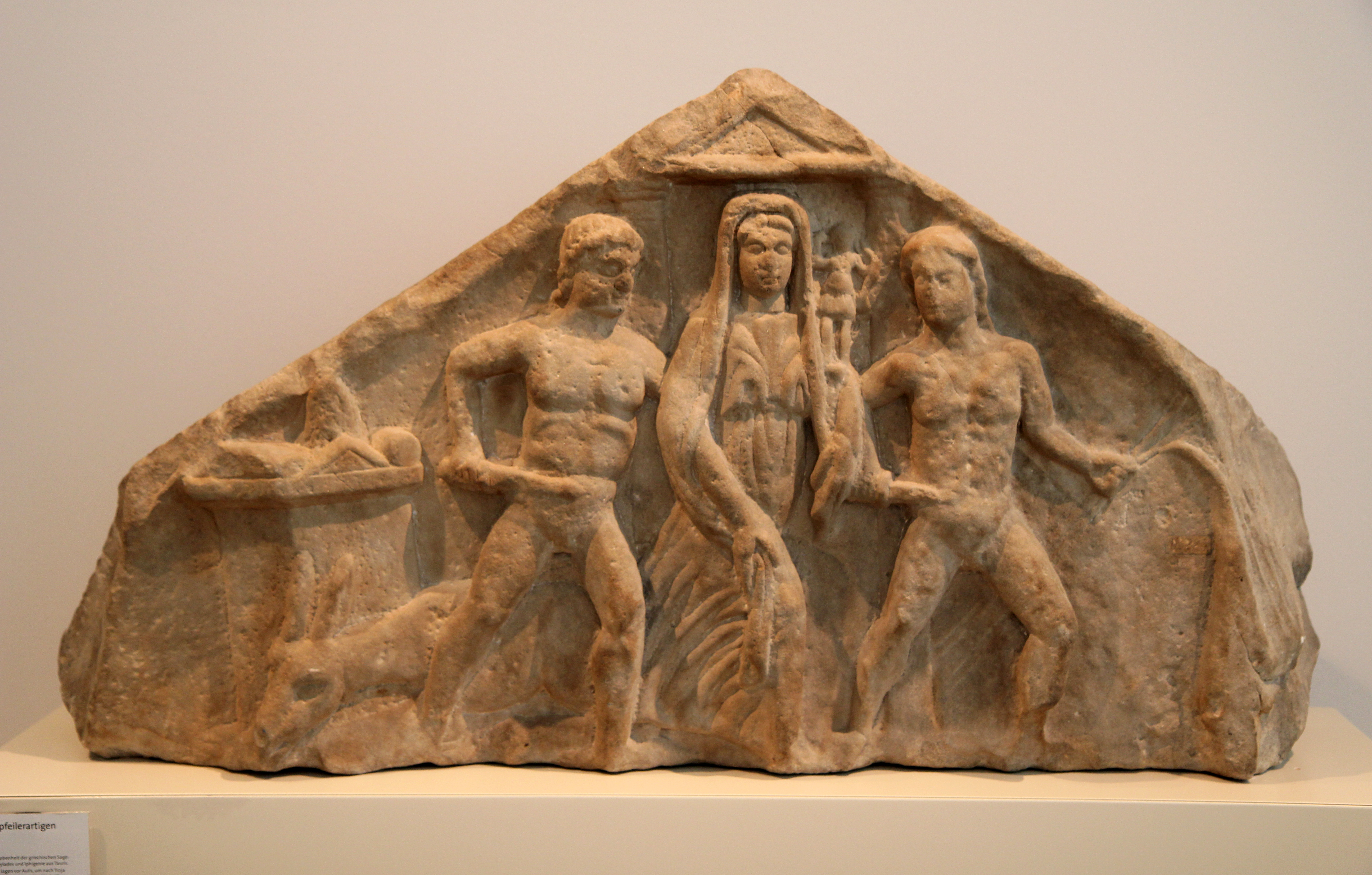 Sandsteingiebel eines römischen Grabhauses aus der 2. Hälfte des 2. Jahrhunderts. Fundort Frenz (Inden), heute ausgestellt im Rheinischen Landesmuseum Bonn